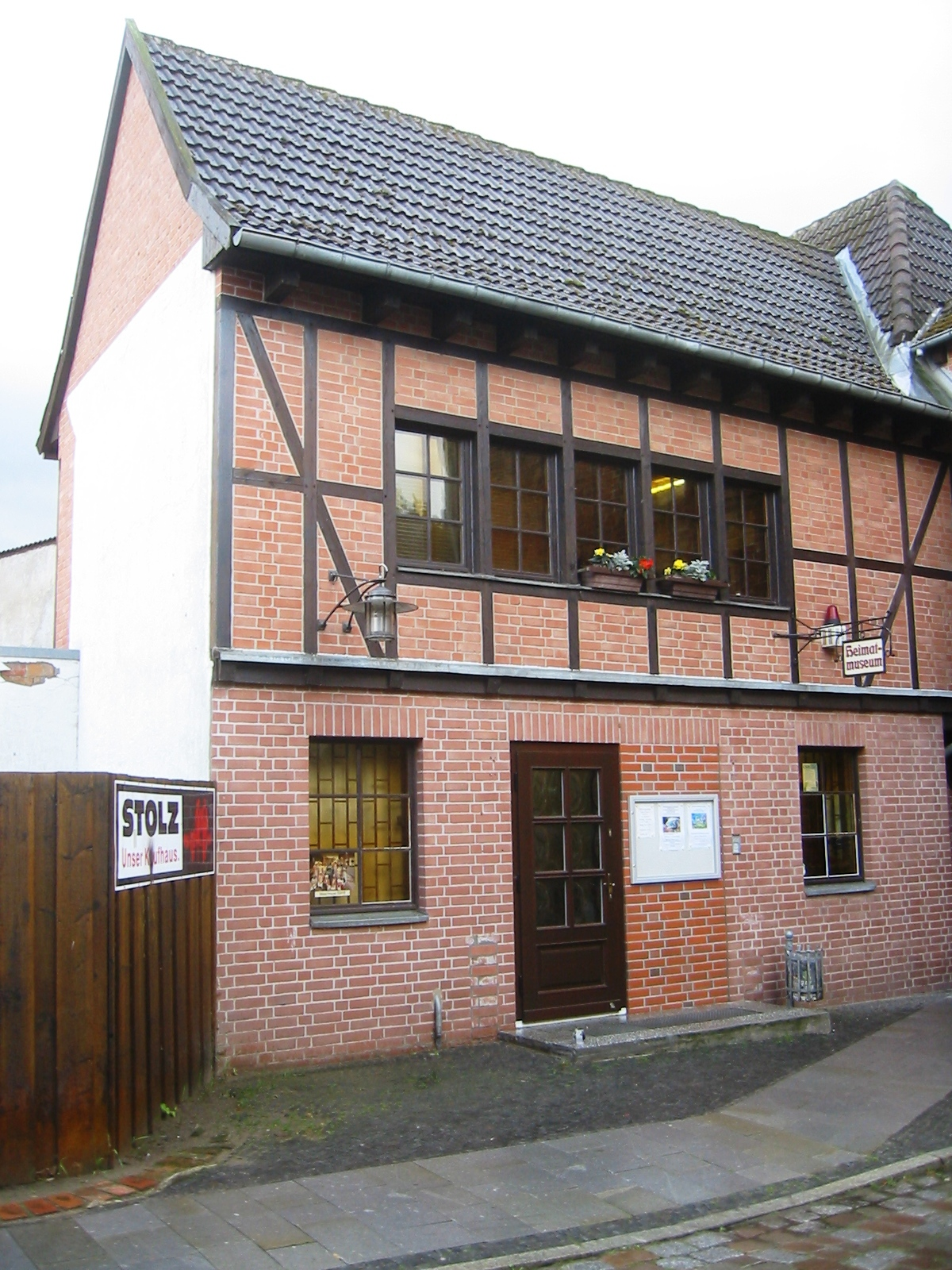 Neubau des Heimatmuseums in Grimmen, das mit dem denkmalgeschützten Mühlentor verbunden wurde